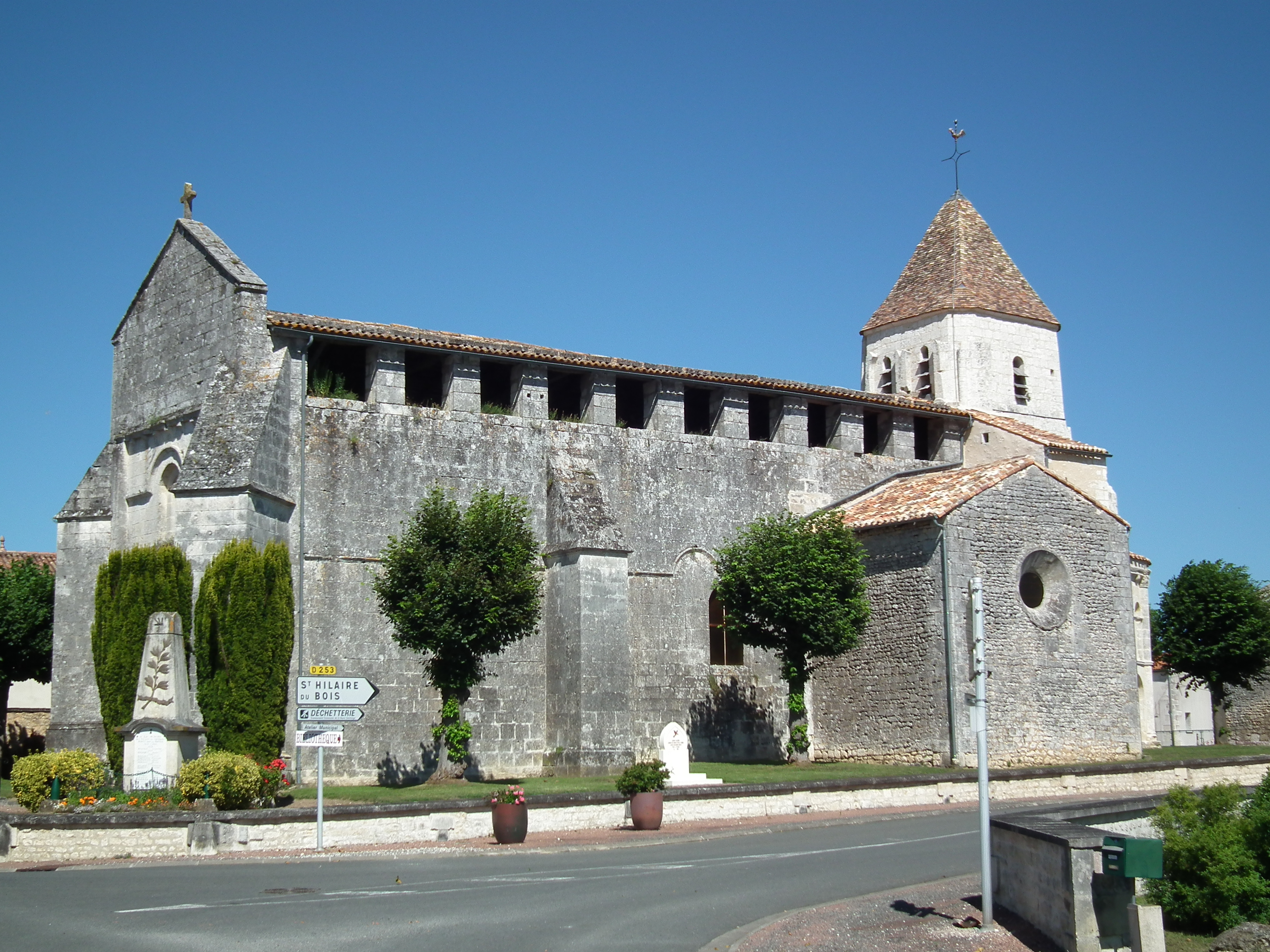 L'église romane de Guitinières